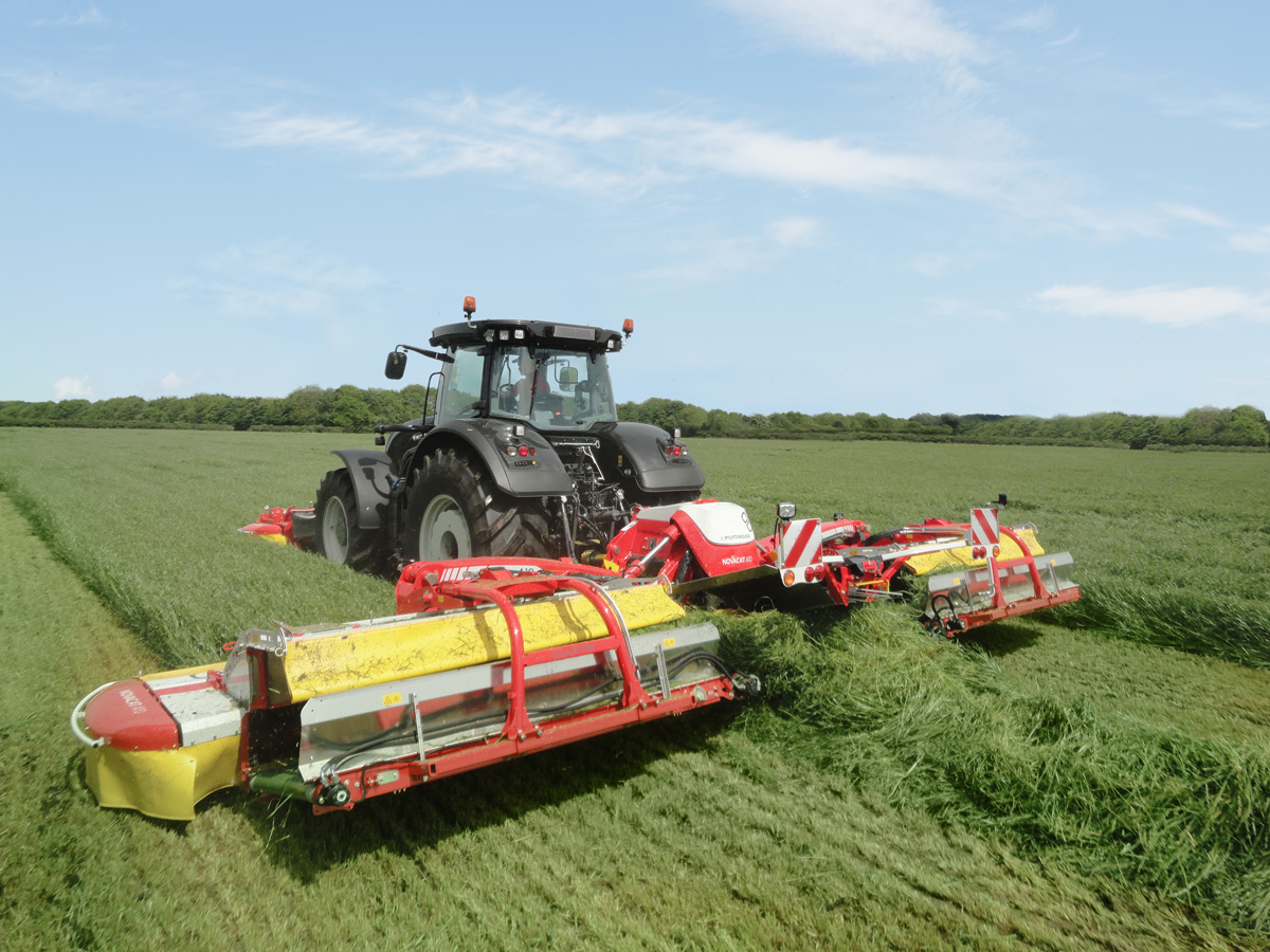 Großflächenmähkombination NOVACAT A10 mit COLLECTOR Schwadzusammenführung